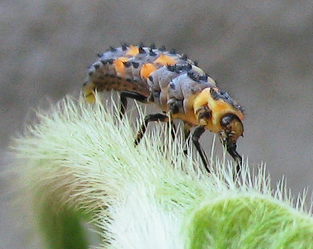 Beschreibung: Marienkäferlarve (Coccinellidae) Fotograf: Darkone, 16. Juli 2005